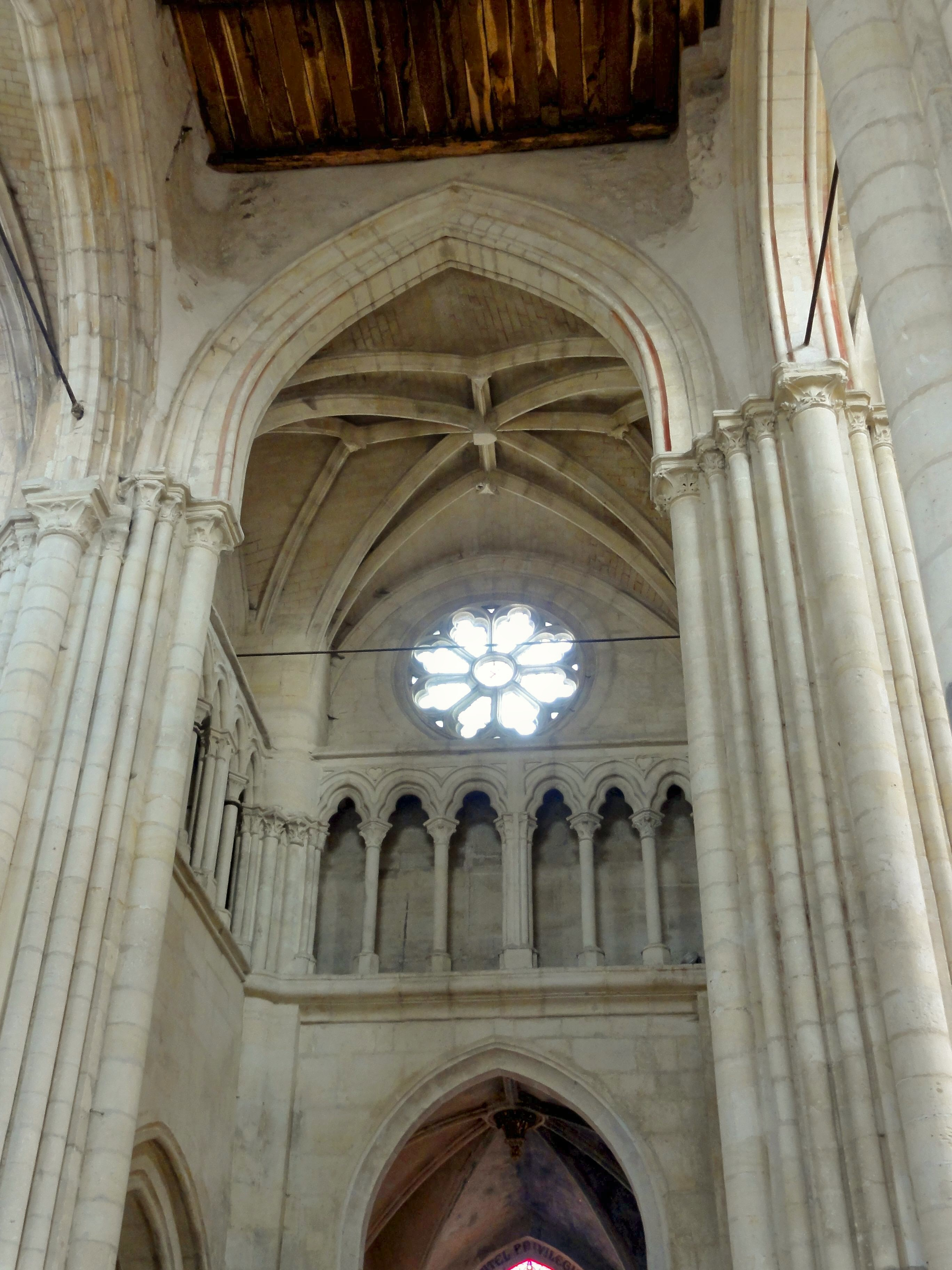 Croisillon nord, triforium et voûte.